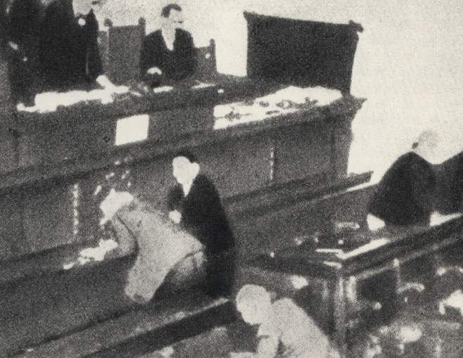 Atentat u Narodnoj skupštini na rukovodioce HSS-a 1928.